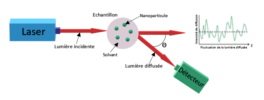 Schéma représentatif du principe de la DLS